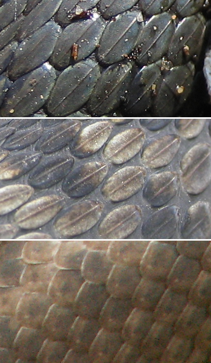 Vipera berusDescription:Vipera berusAuthor:Zdeněk FricLicense:GFDL